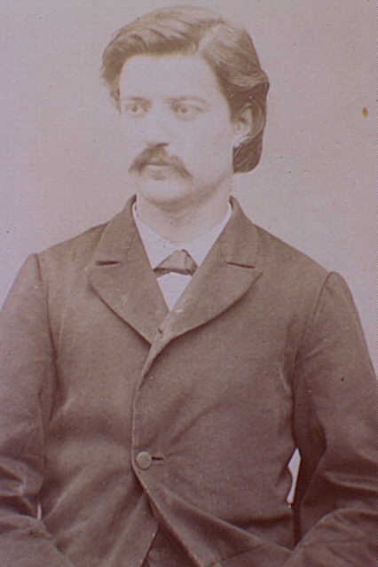 Henry Louis Champy (1846-1902)